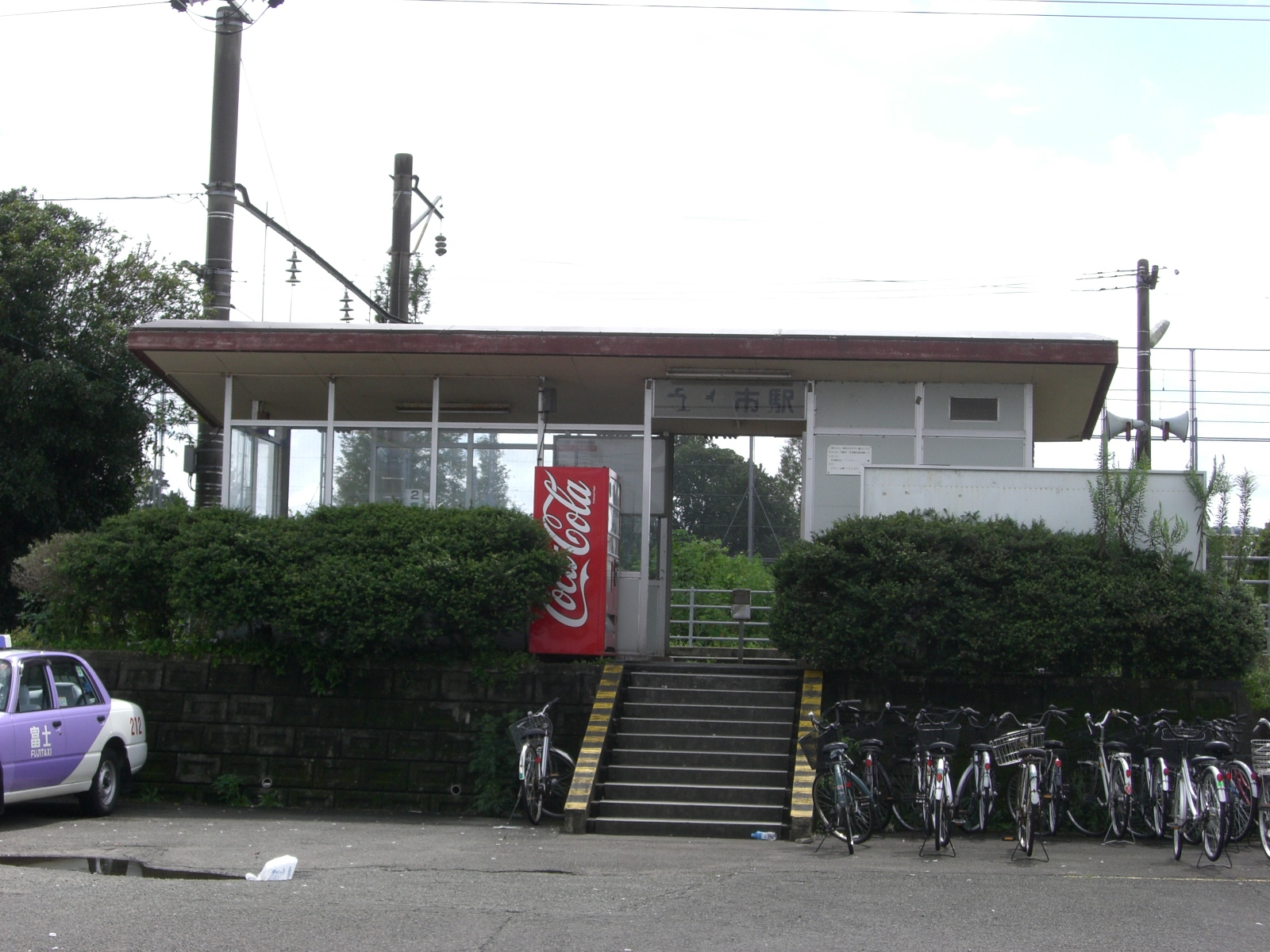 五十市駅